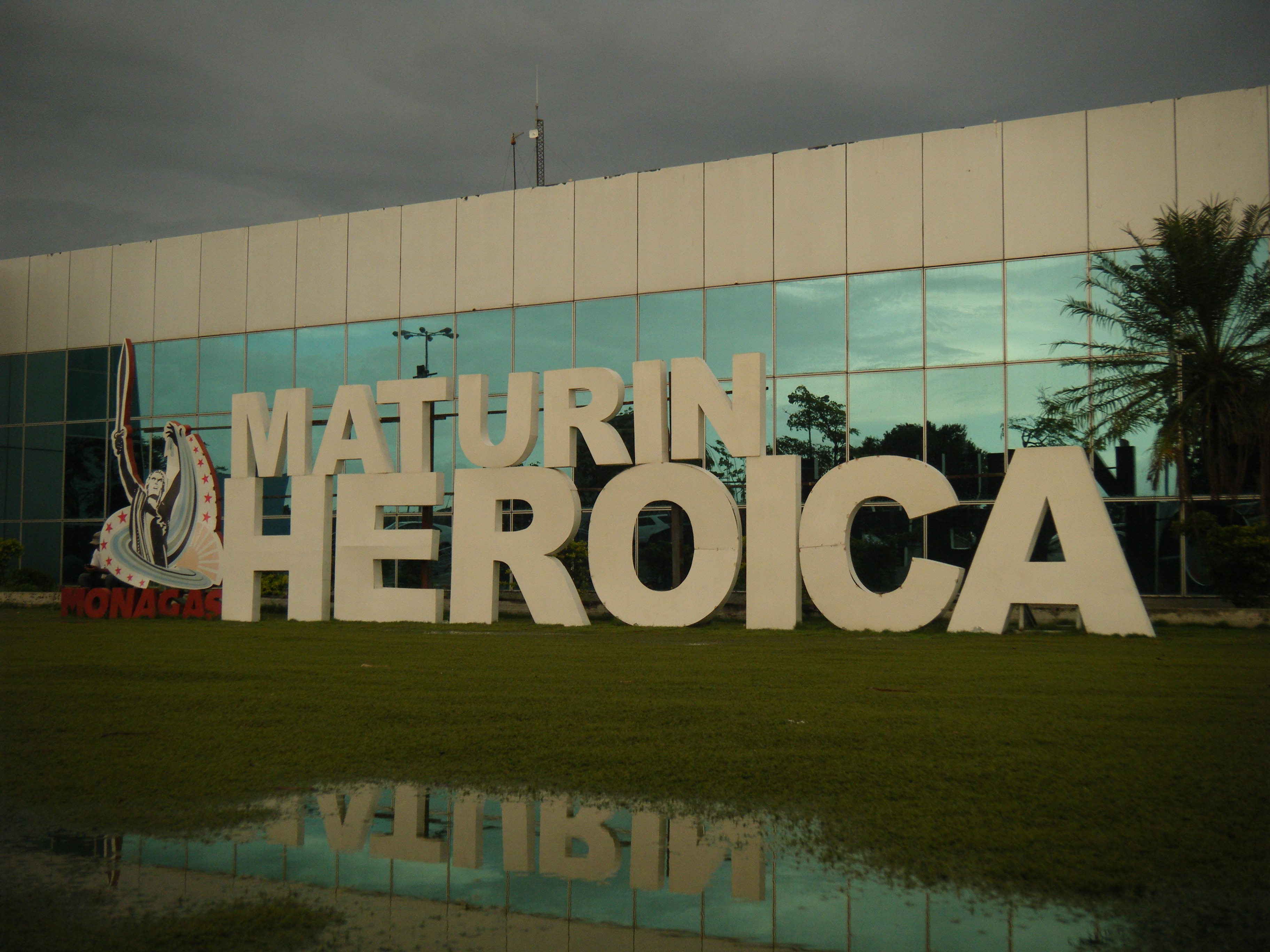 Letrero de bienvenida en el Aeropuerto Jose Tadeo Monagas en la ciudad de Maturín. Para el 2017, fue retirado este letrero.